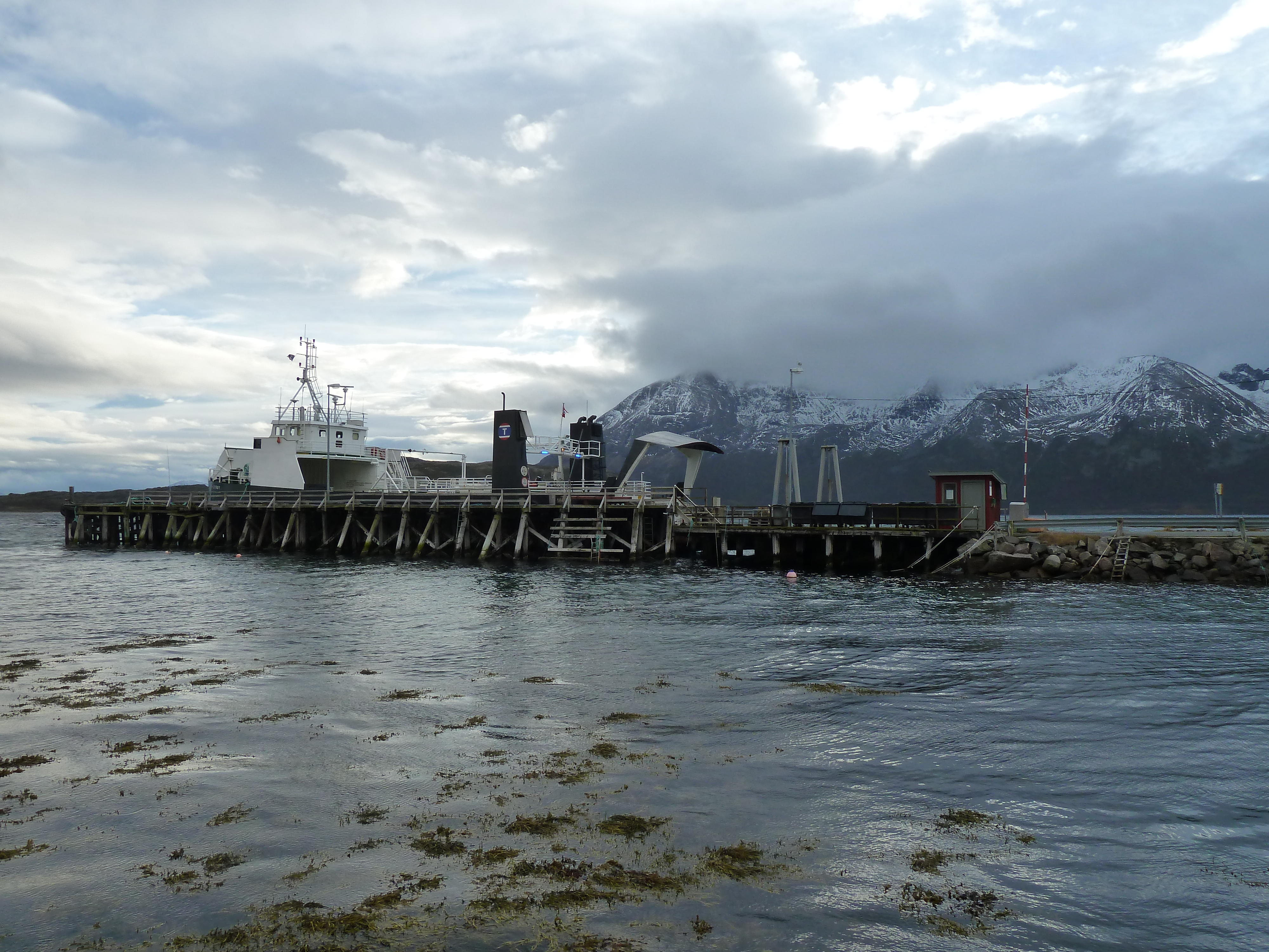 BF Dyrøy (IMO 6413352) til kai i Bjarkøy, Troms, i 2010.